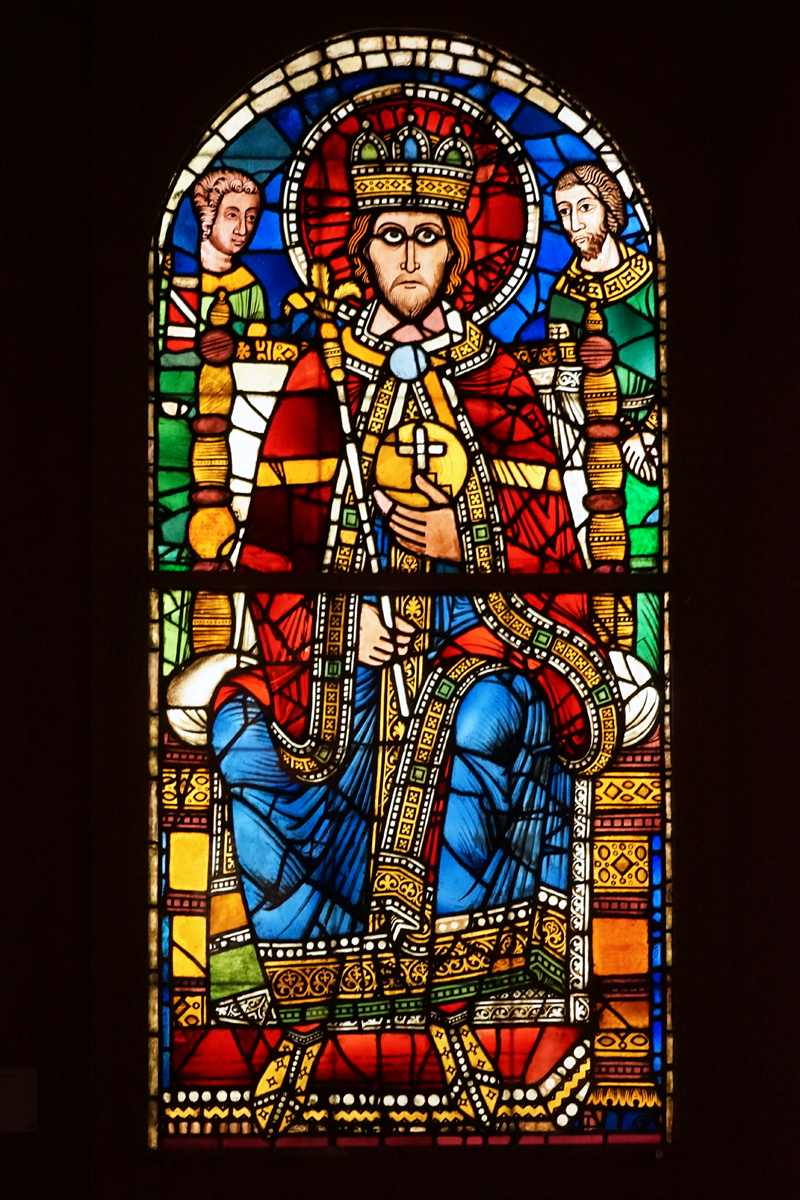 Empereur en majesté Vitrail dernier quart du XIIème siècle Cathédrale de Strasbourg déposé au musée vers 1880 Oeuvre présentée au musée de l'oeuvre Notre-Dame à Strasbourg